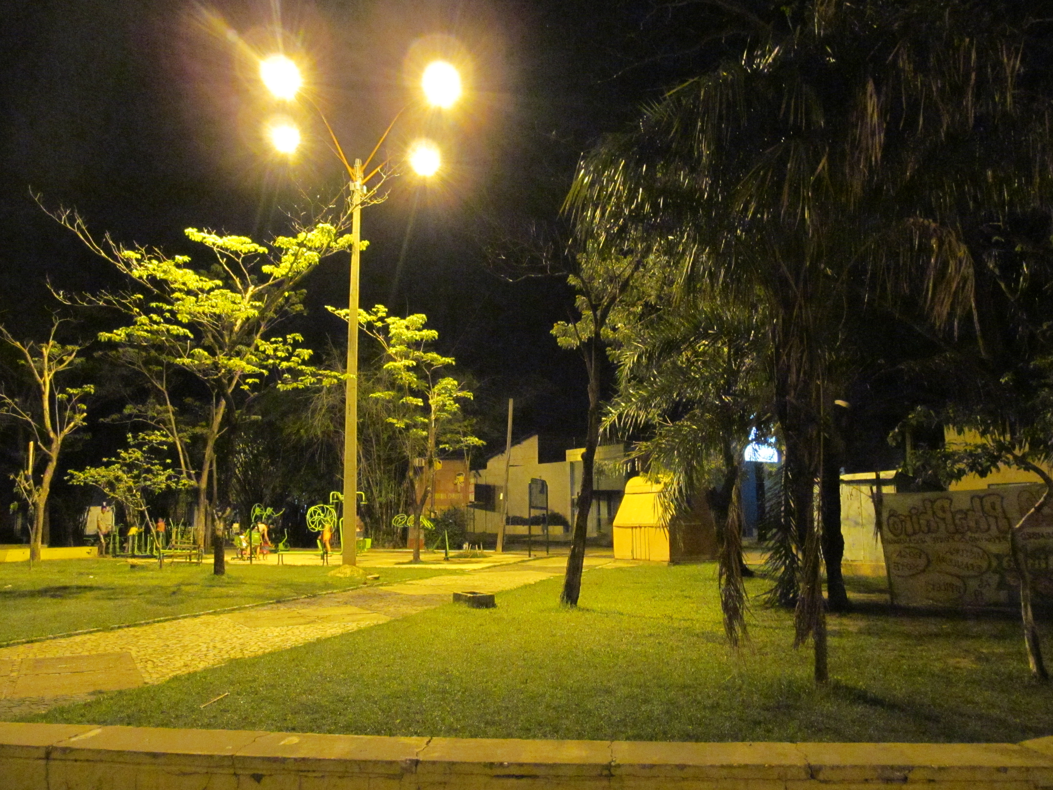 Ponto de referência do Bairro Mocambinho, a praça Paulo de Tarso(conhecida praça da Telemar) é uma opção de passeio.